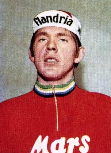 Éric de Vlaeminck, 'Sprint 71', Panini figurina n°10.